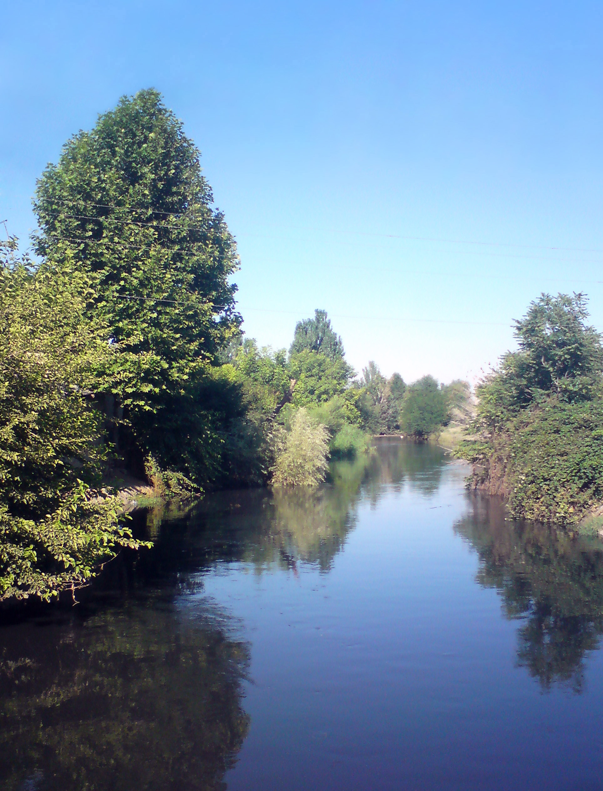 Канал Салар перед разделением на три канала, посёлок Уртааул, Ташкентская область